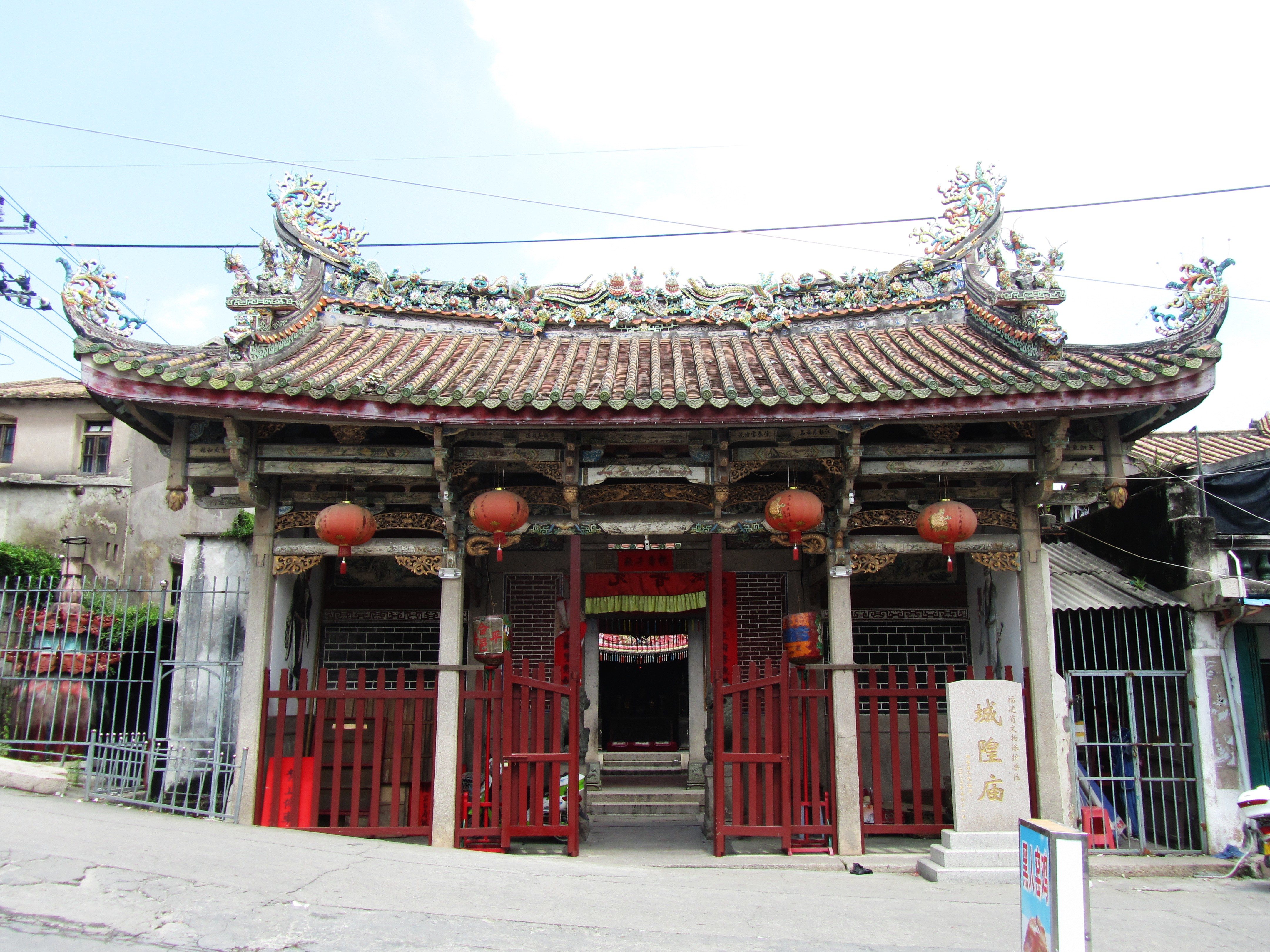 诏安城隍庙，大门正面。